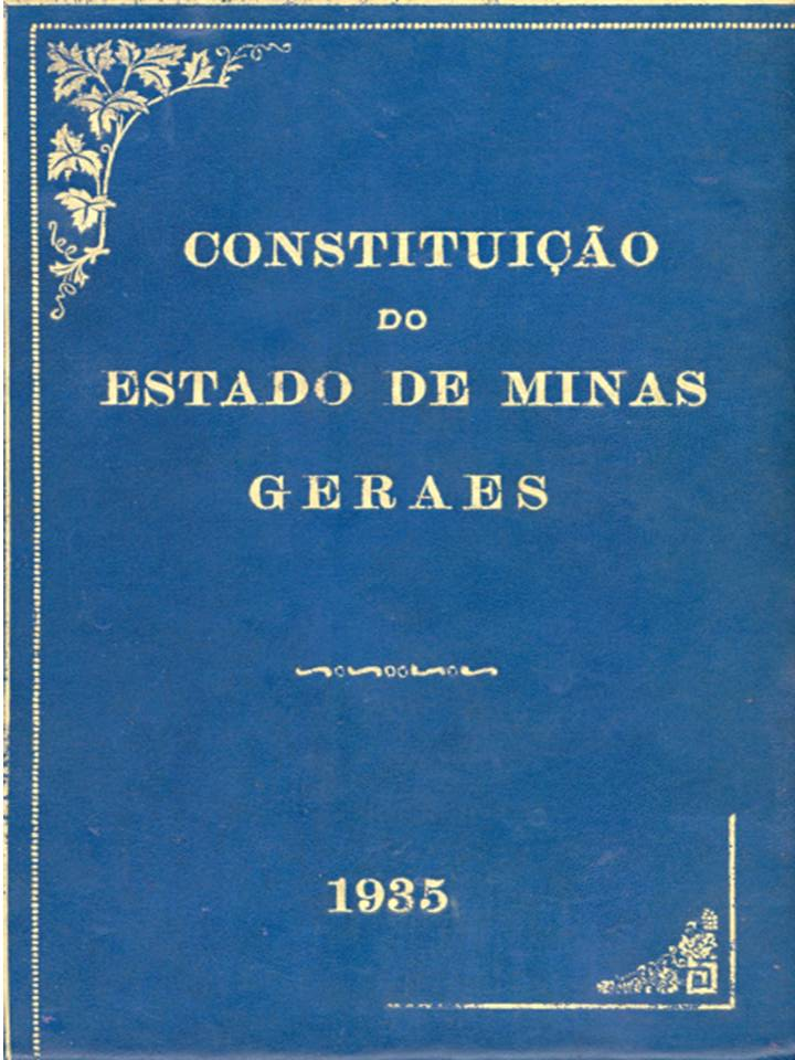 Capa da Constituição do Estado de Minas Gerais de 1935.